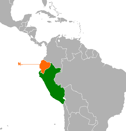 Ecuador y Perú.